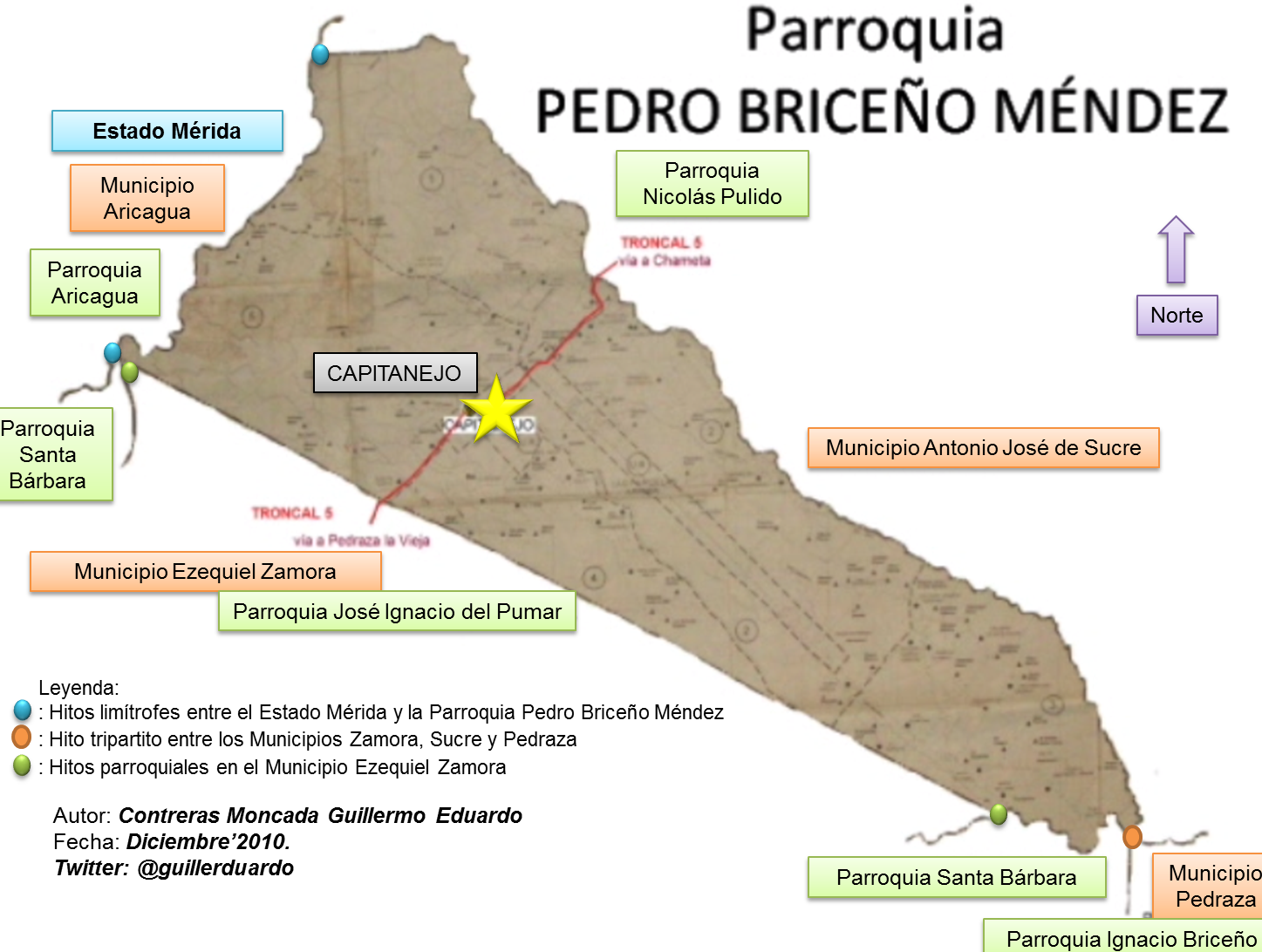 Mapa de la Parroquia Pedro Briceño Méndez, en el cual se ubica a su Capital, Capitanejo, así mismo se detalla los limites con las vecinas parroquias, municipios y estados.